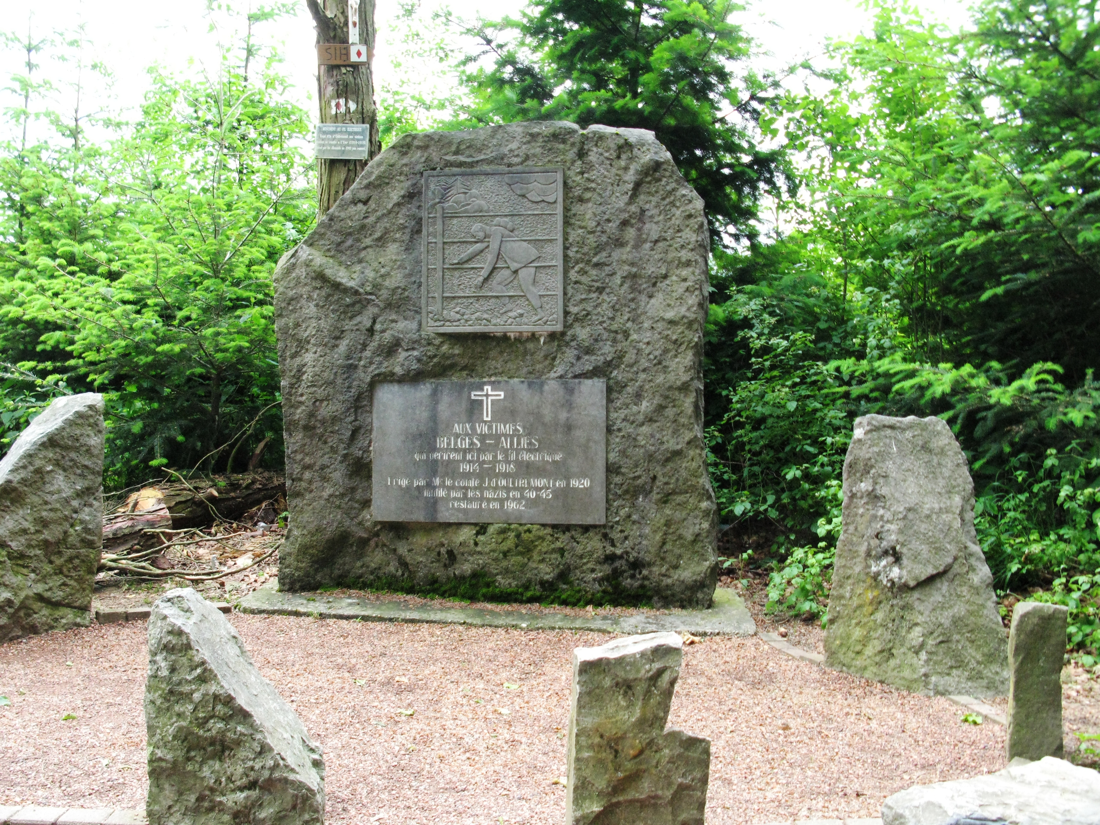 Monument à Teuven pour les vistimes du fil haute tension installé par les allemands à la fronière avec les Pays-Bas